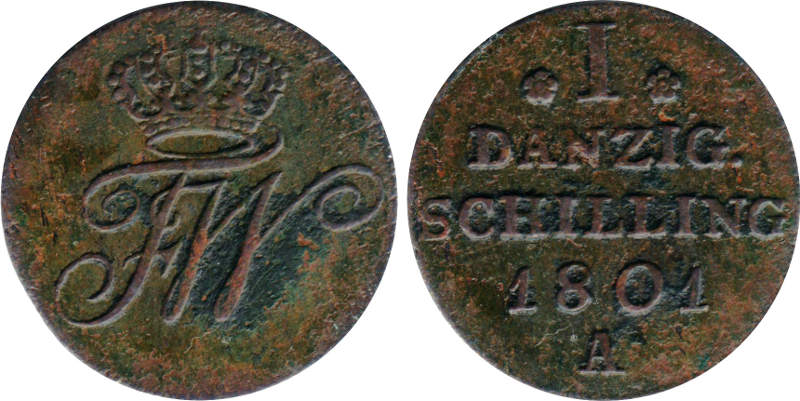 1 szelag 1801 A